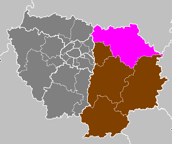 Maps of arrondissements and cantons of France: Département de Seine-et-Marne - Arrondissement de Meaux.PNG (Région Île-de-France)